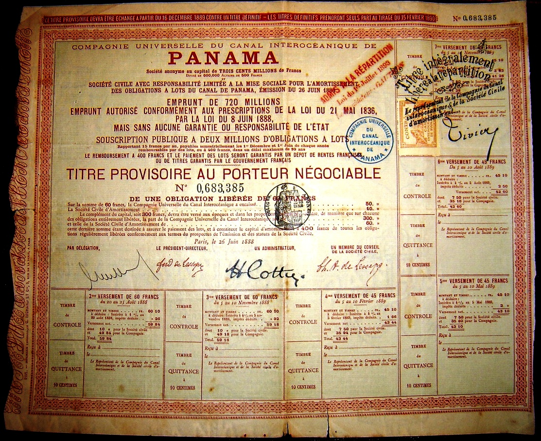 Action provisoire de la Compagnie Universelle du canal interocéanique de Panamà